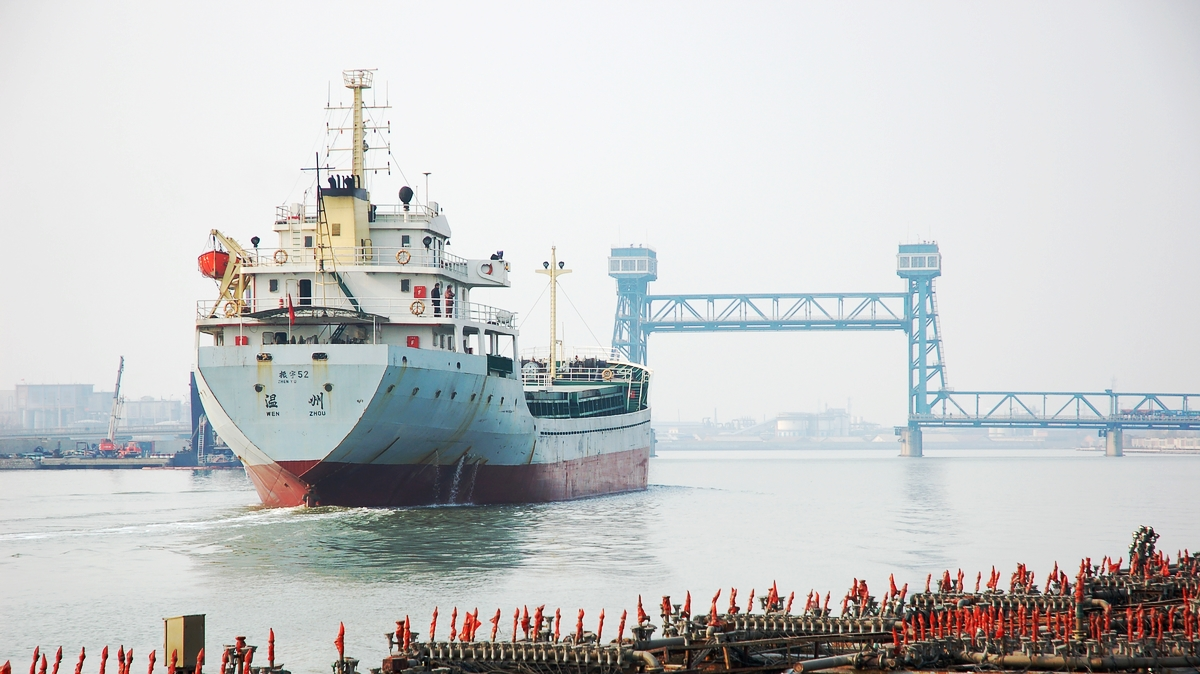 海河下游通航的货轮